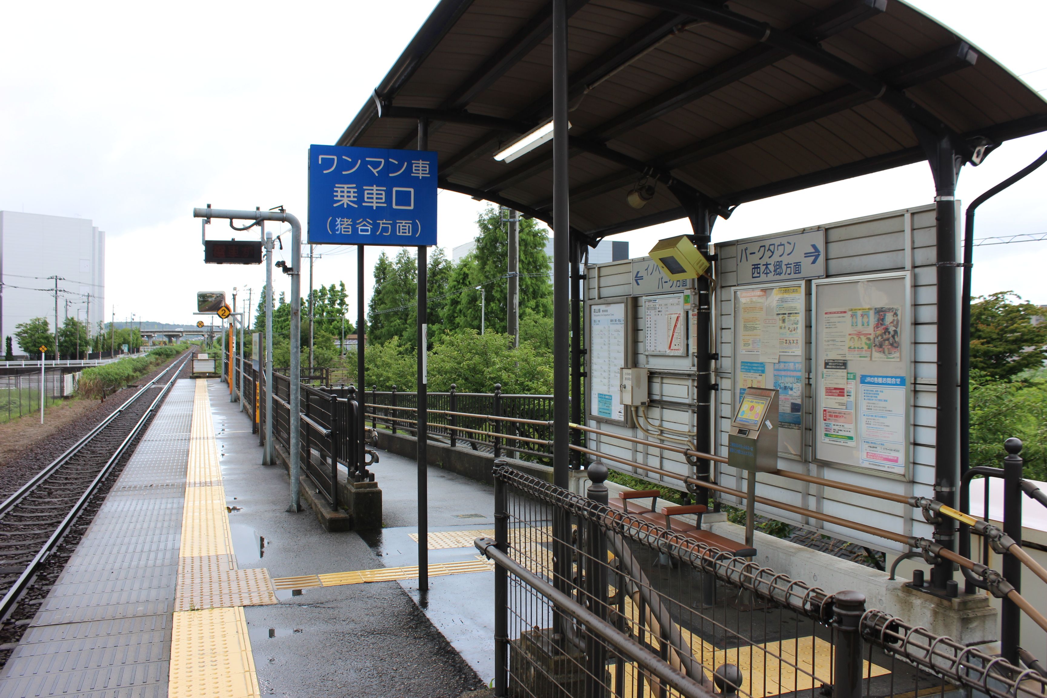 婦中鵜坂駅（富山県富山市） Canon EOS Kiss X5